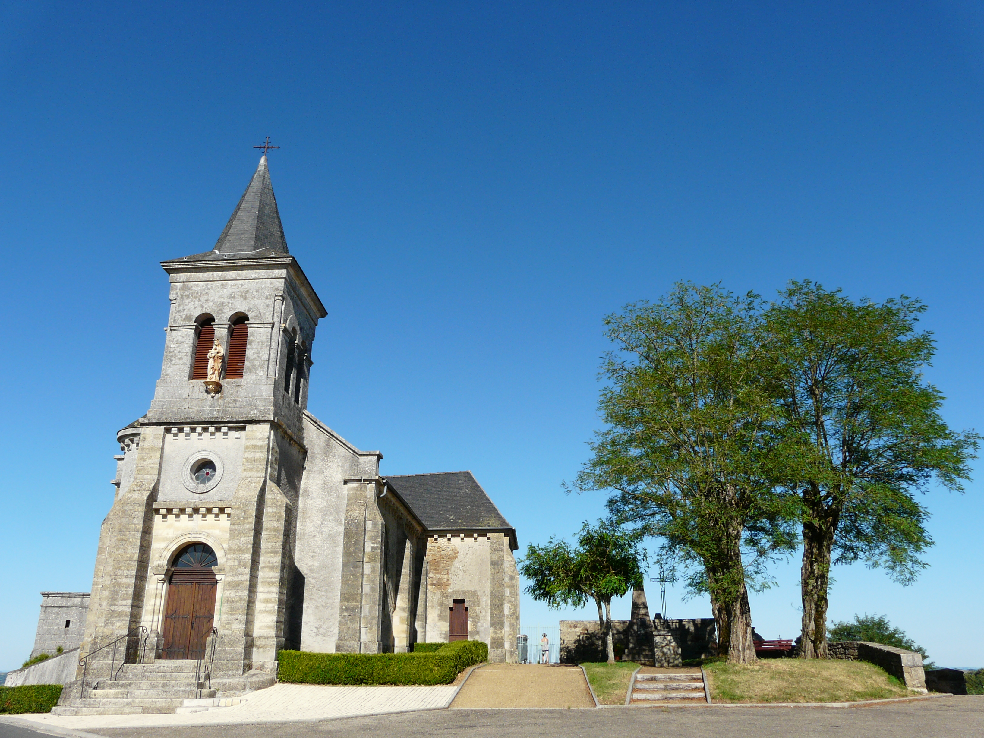 L'église Notre-Dame-de-la-Nativité, Châtres, Dordogne, France.